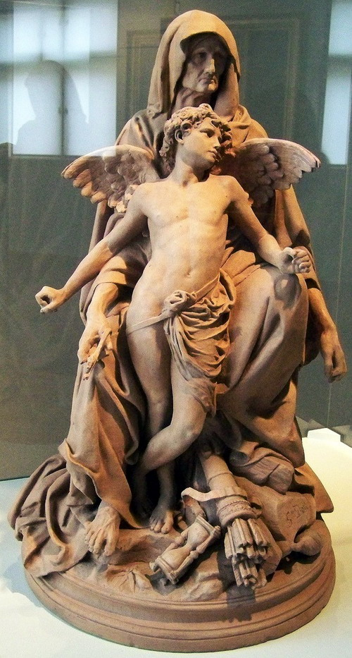 Доре Парка і божок кохання Ерот 1877: скульптура алегорія